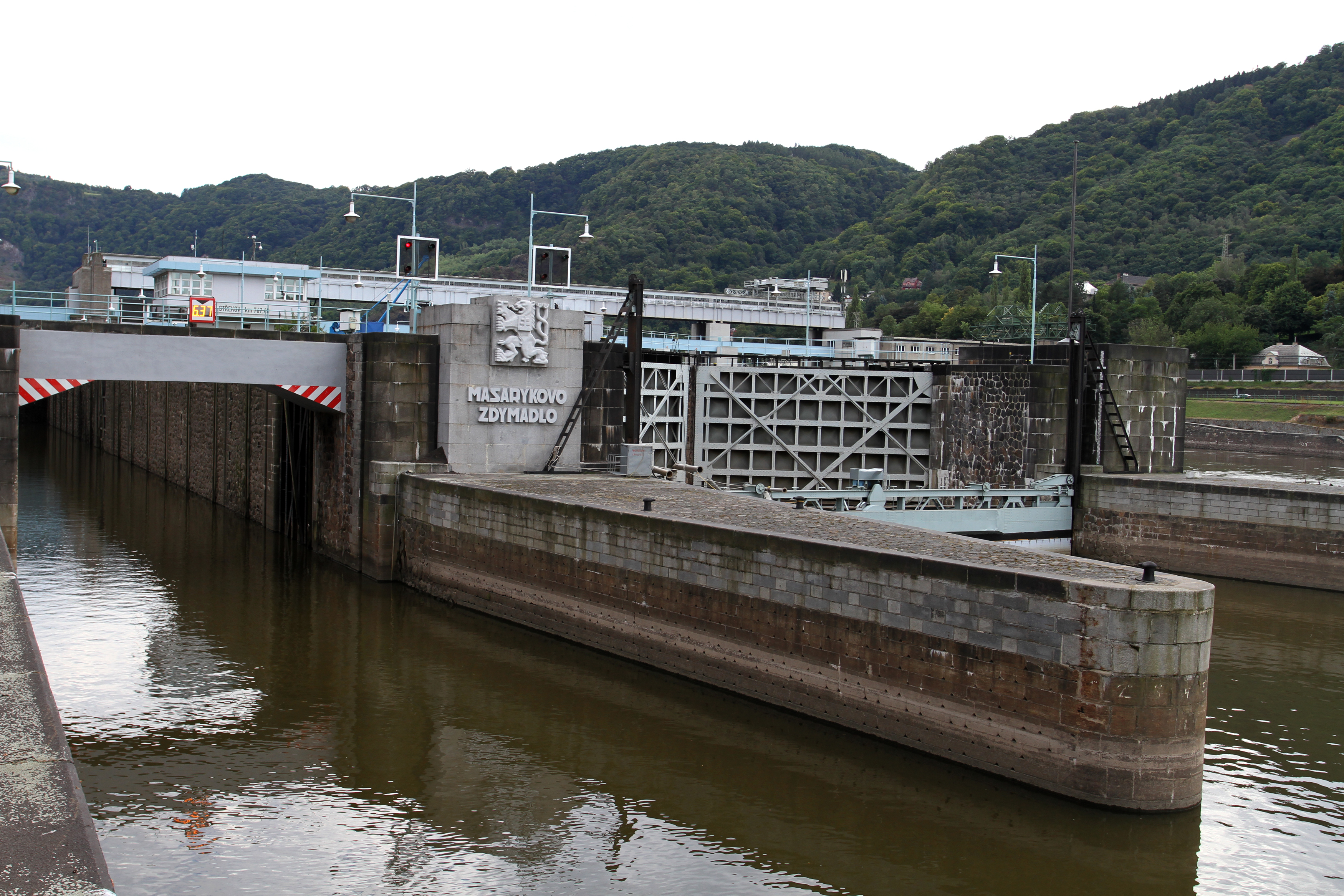 Zdymadlo (Střekov), pod hradem, Střekov